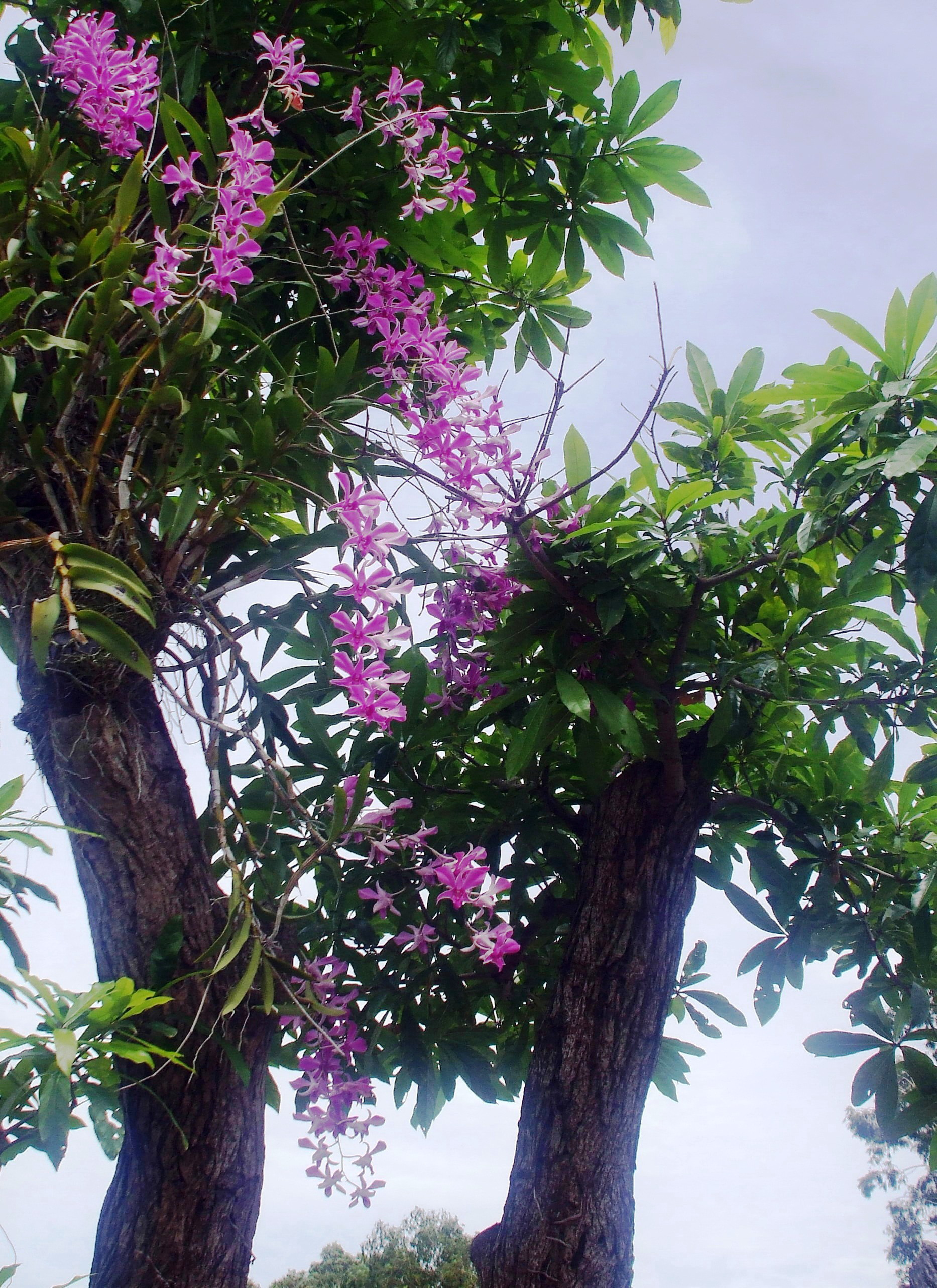 Hoa lan khoe sắc trên cây cổ thụ